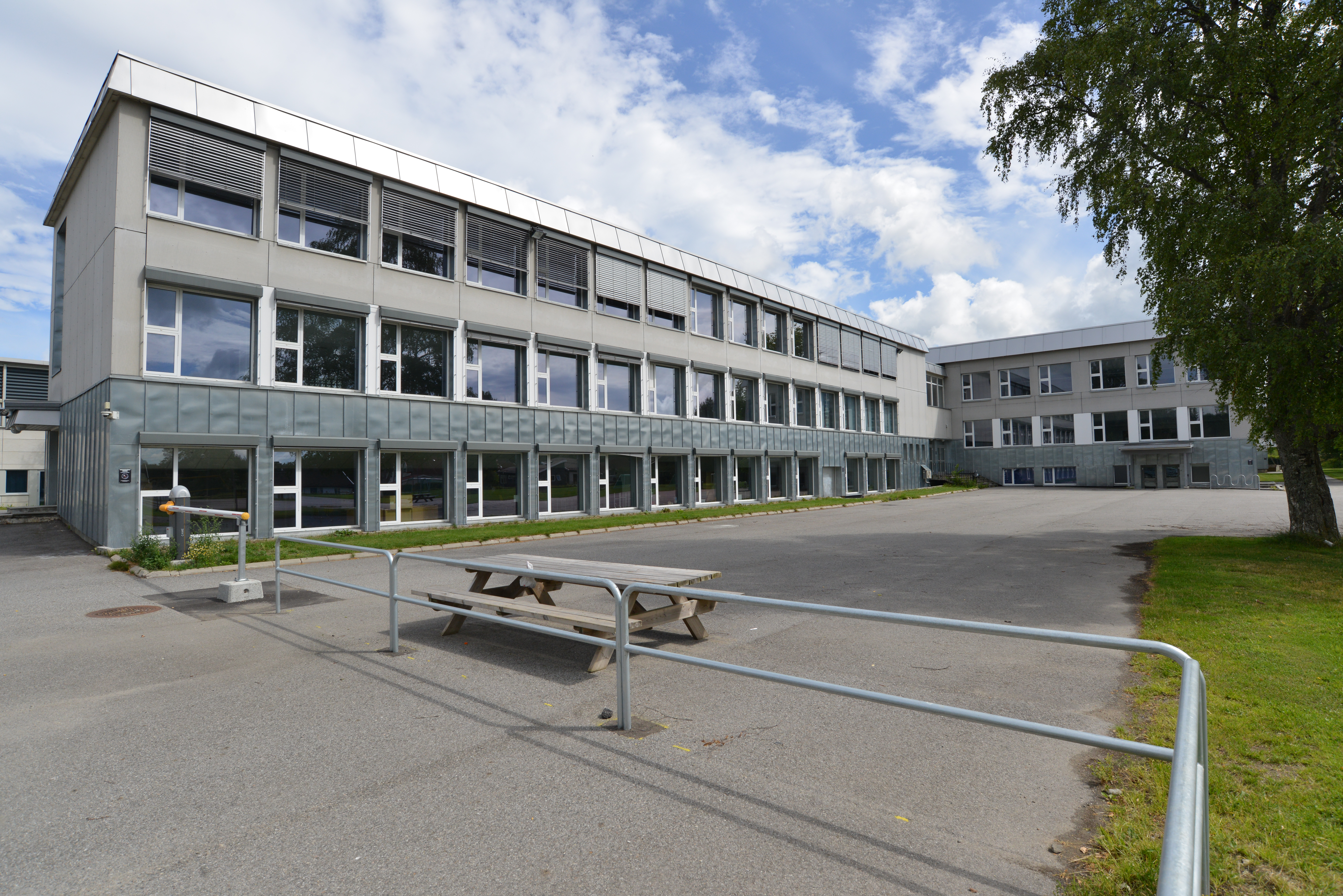 Allergot ungdomsskole på Jessheim